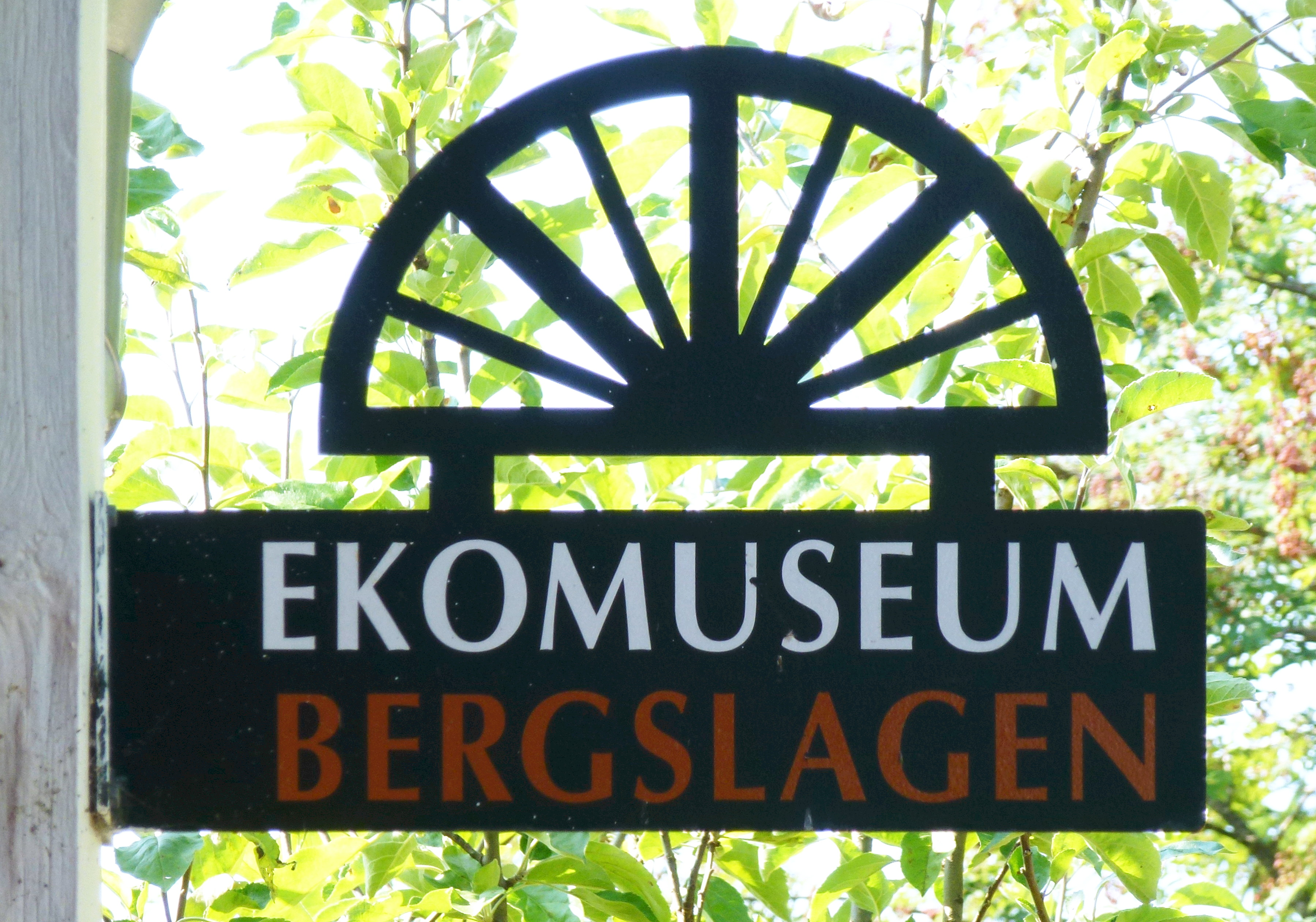 Flogbergets gruvor skylt: "Ekomuseum Bergslagen"